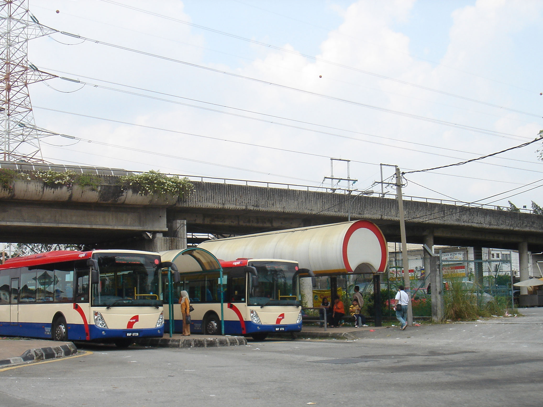 Rapid KL Buses at Cheras Bus Station, Kuala Lumpur, Malaysia.